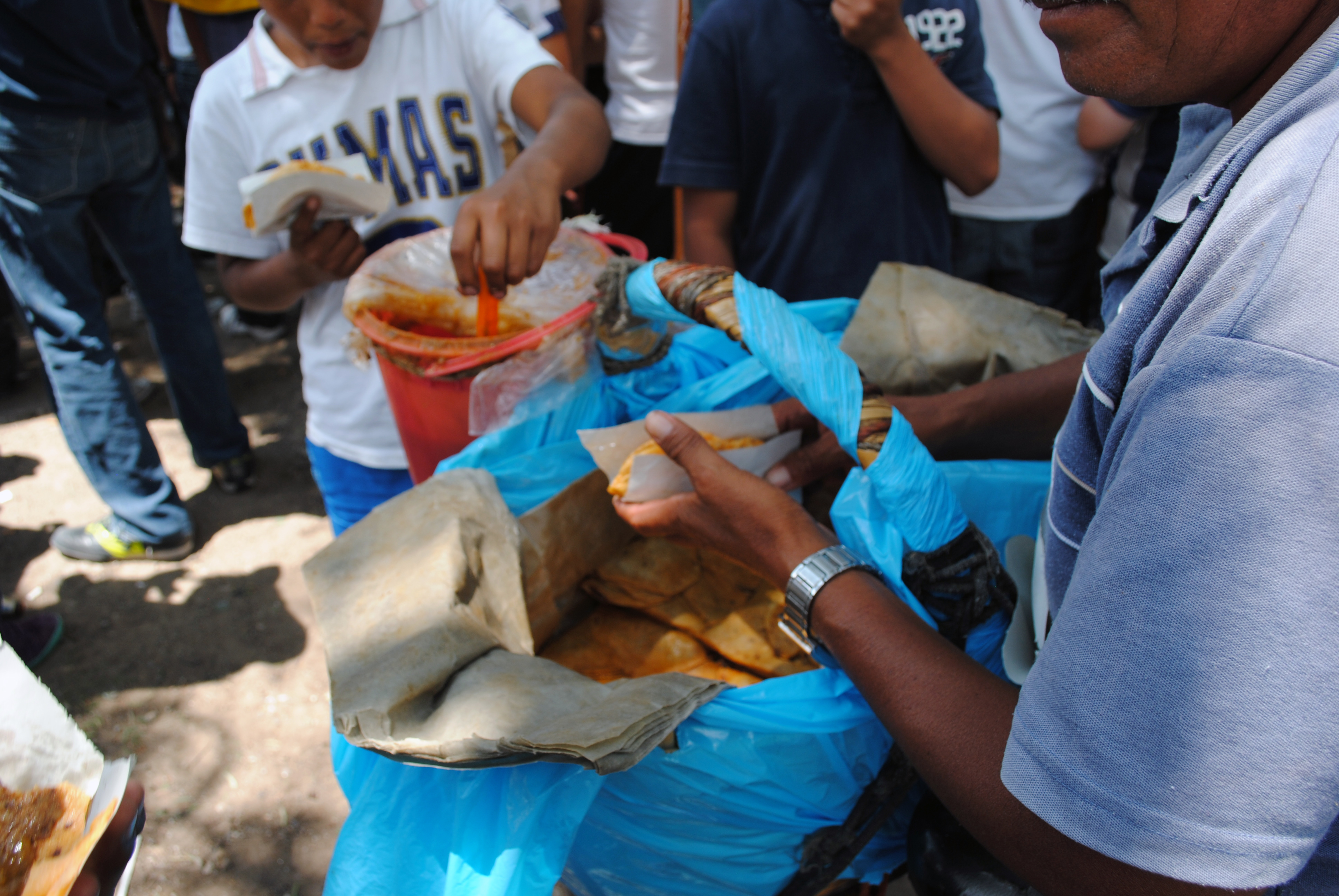 Vendedor de tacos de canasta en el Estadio Olímpico Universitario.